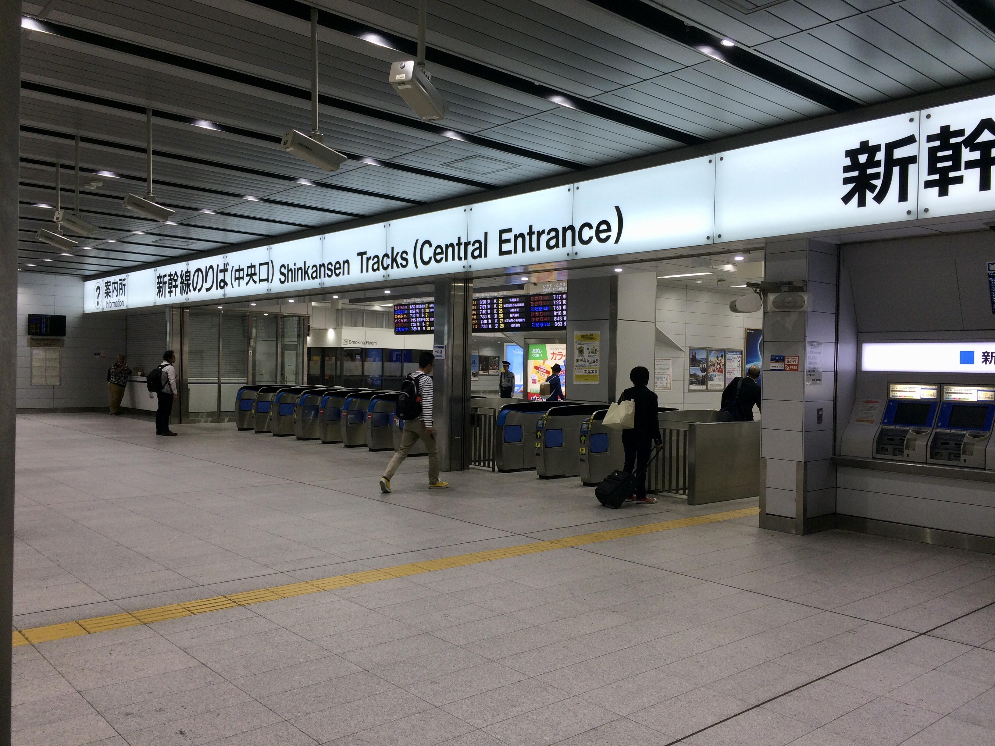 東海道・山陽新幹線新大阪駅中央口